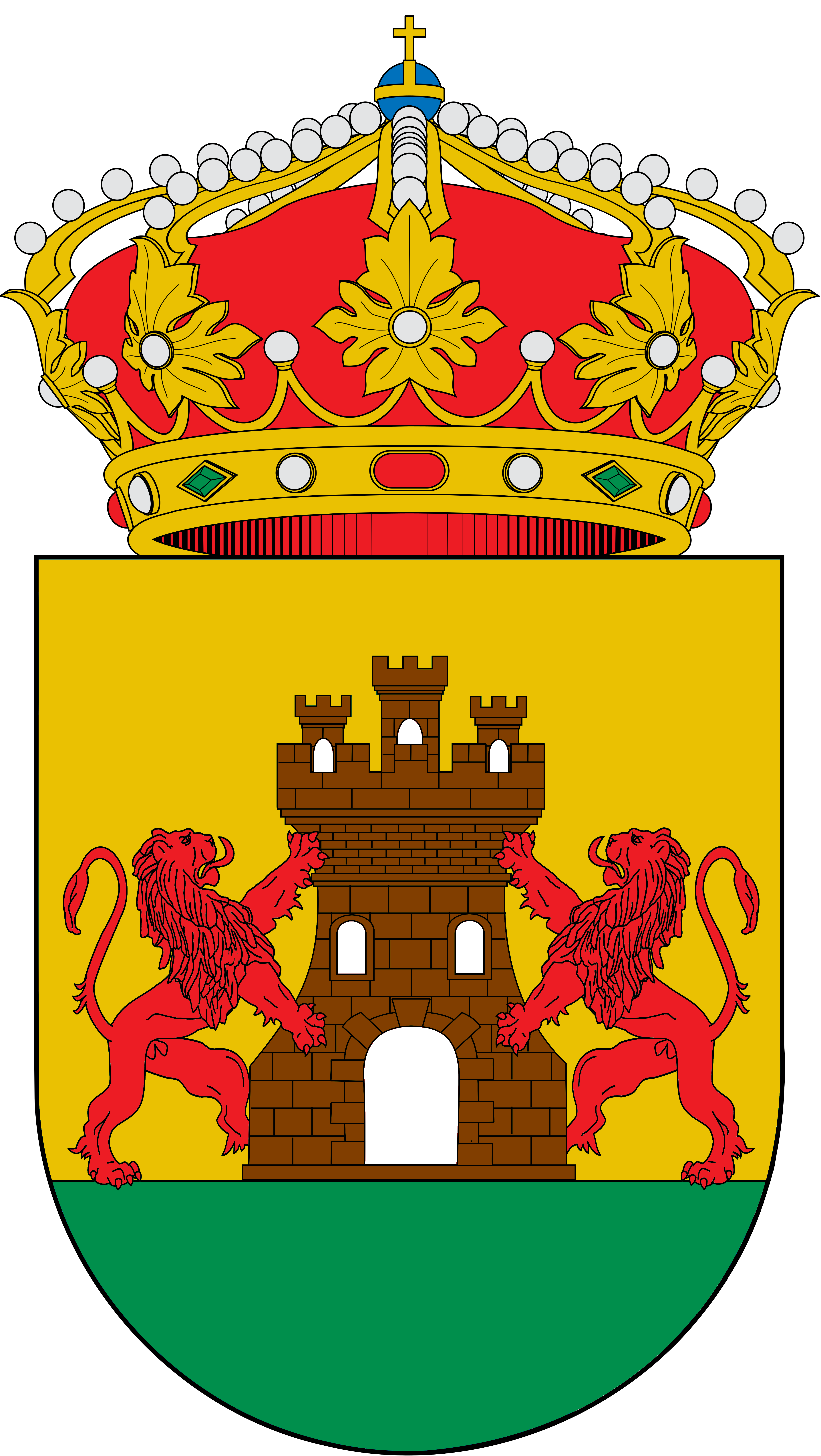 Escudo de Arenas, Málaga: Escudo de oro, terrasado de sinople, con un castillo en sus colores naturales acompañado de sendos leones rampantes de gules. Al timbre, corona real cerrada.